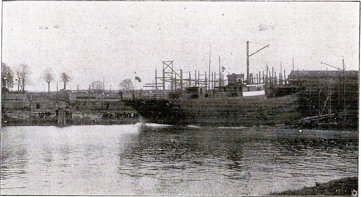 Stapellauf der Anneliese in Lübeck am 4. April 1908 auf der Schiffwerft von Henry Koch.